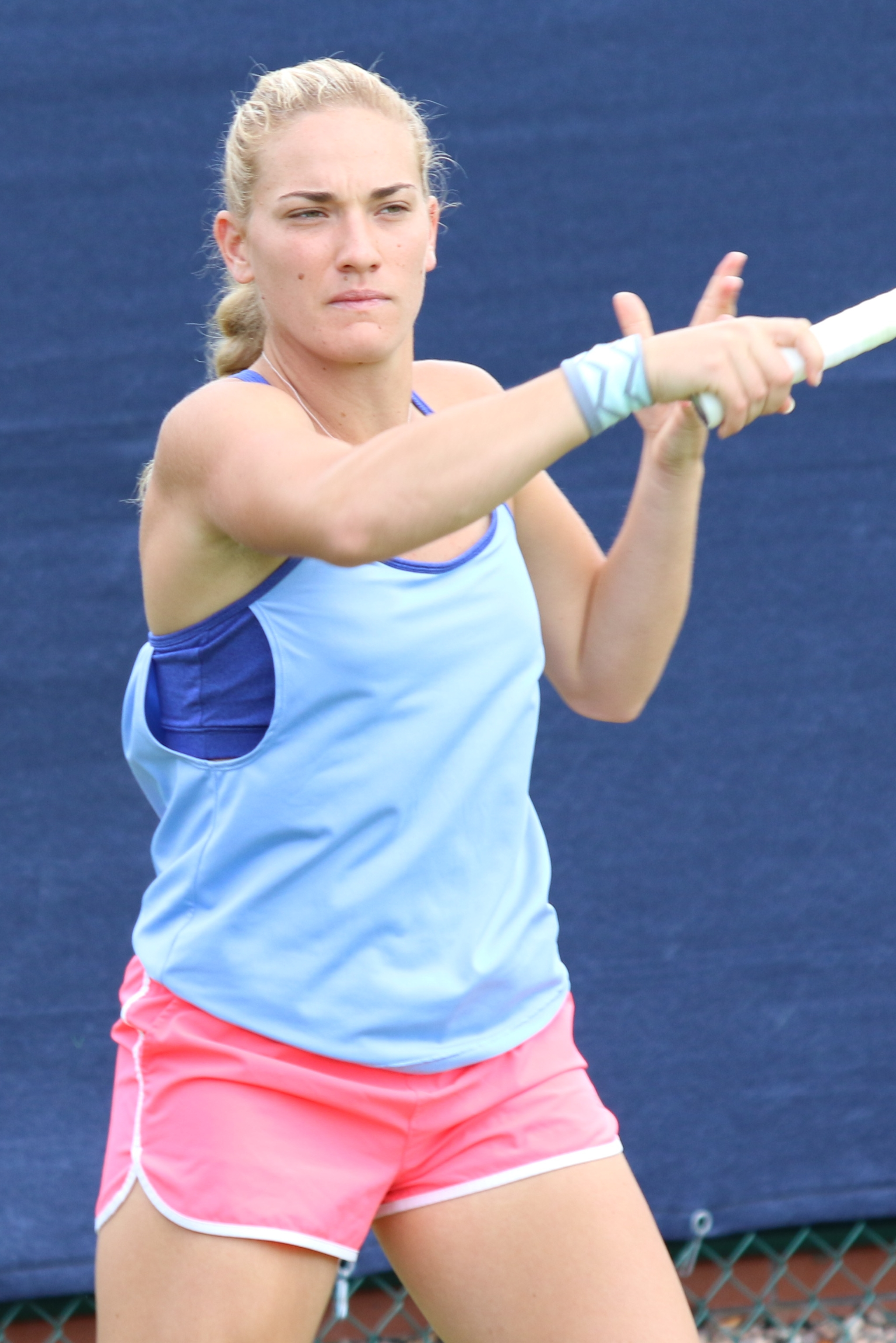 Babos BM16 (9)